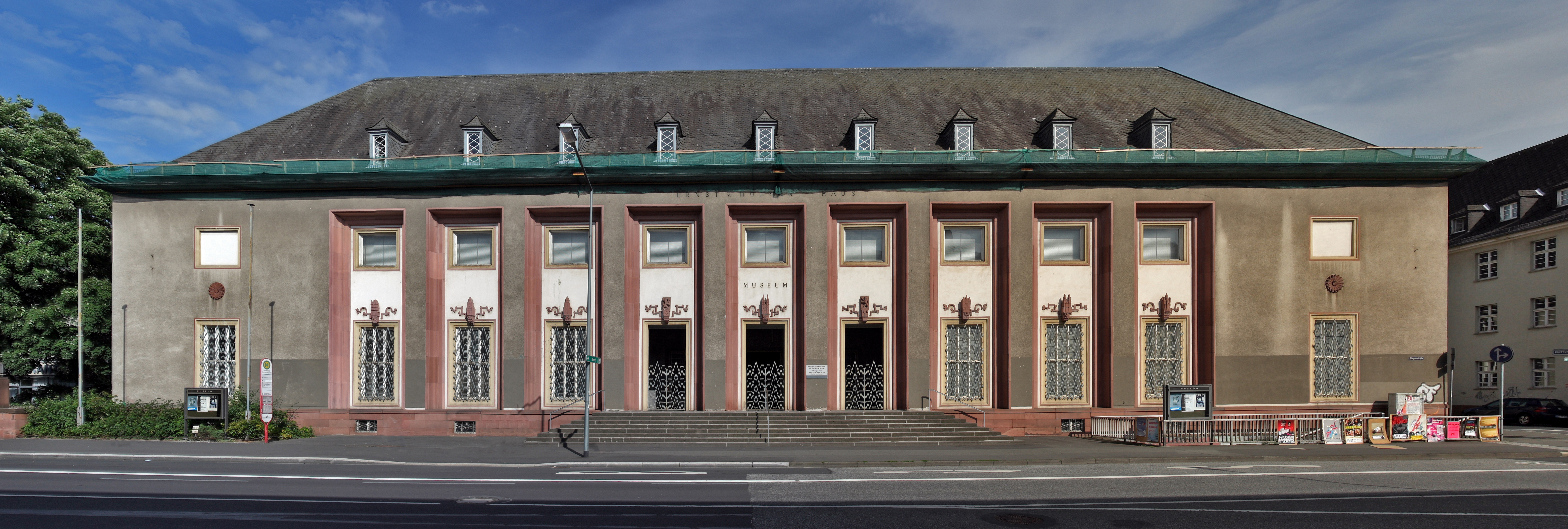 Ernst-von-Hülsen-Haus (2008), Sitz des Deutschen Dokumentationszentrum für Kunstgeschichte – Bildarchiv Foto Marburg.